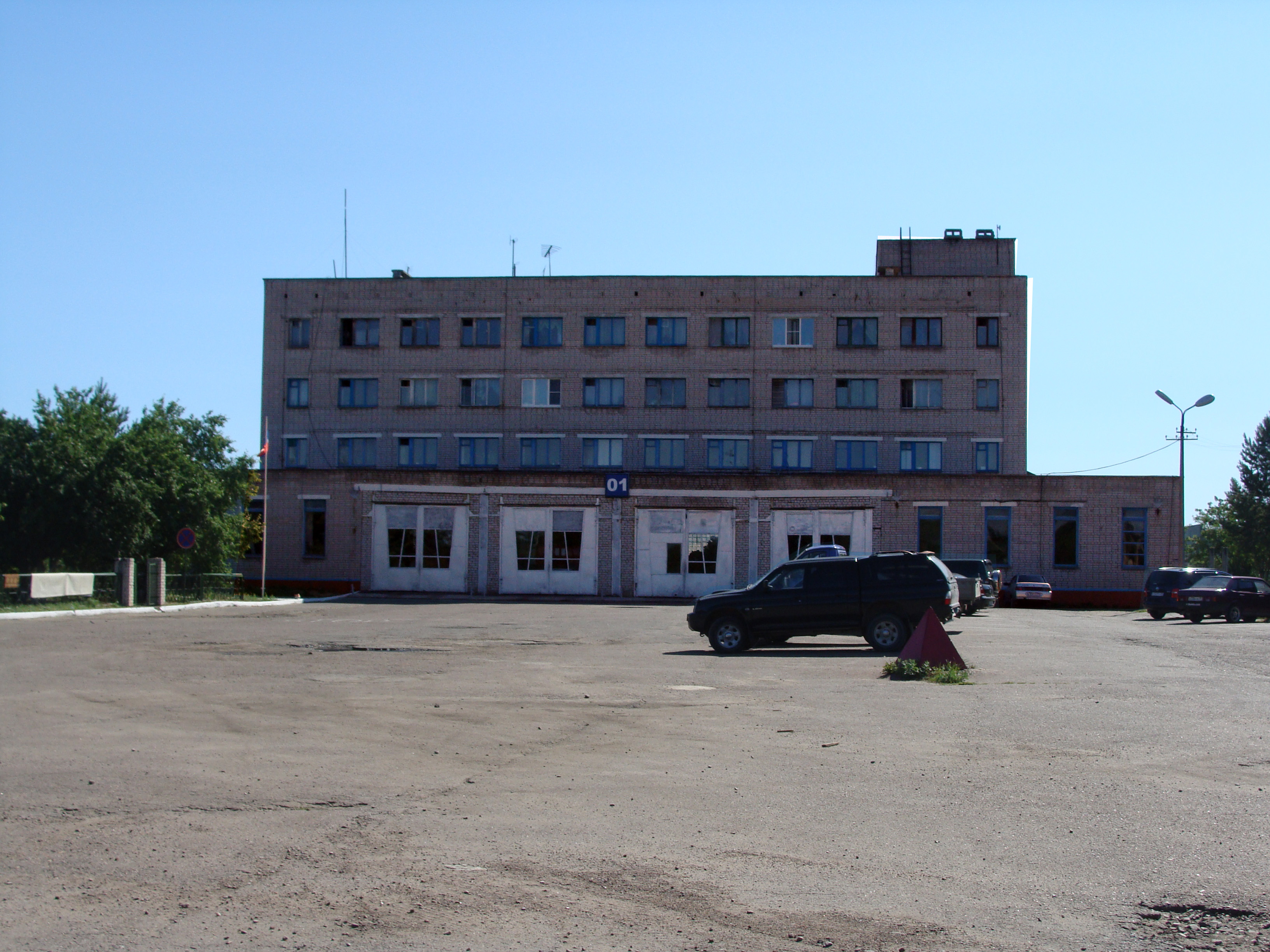 Пожарная часть. Котлас, ул. Конституции 20а